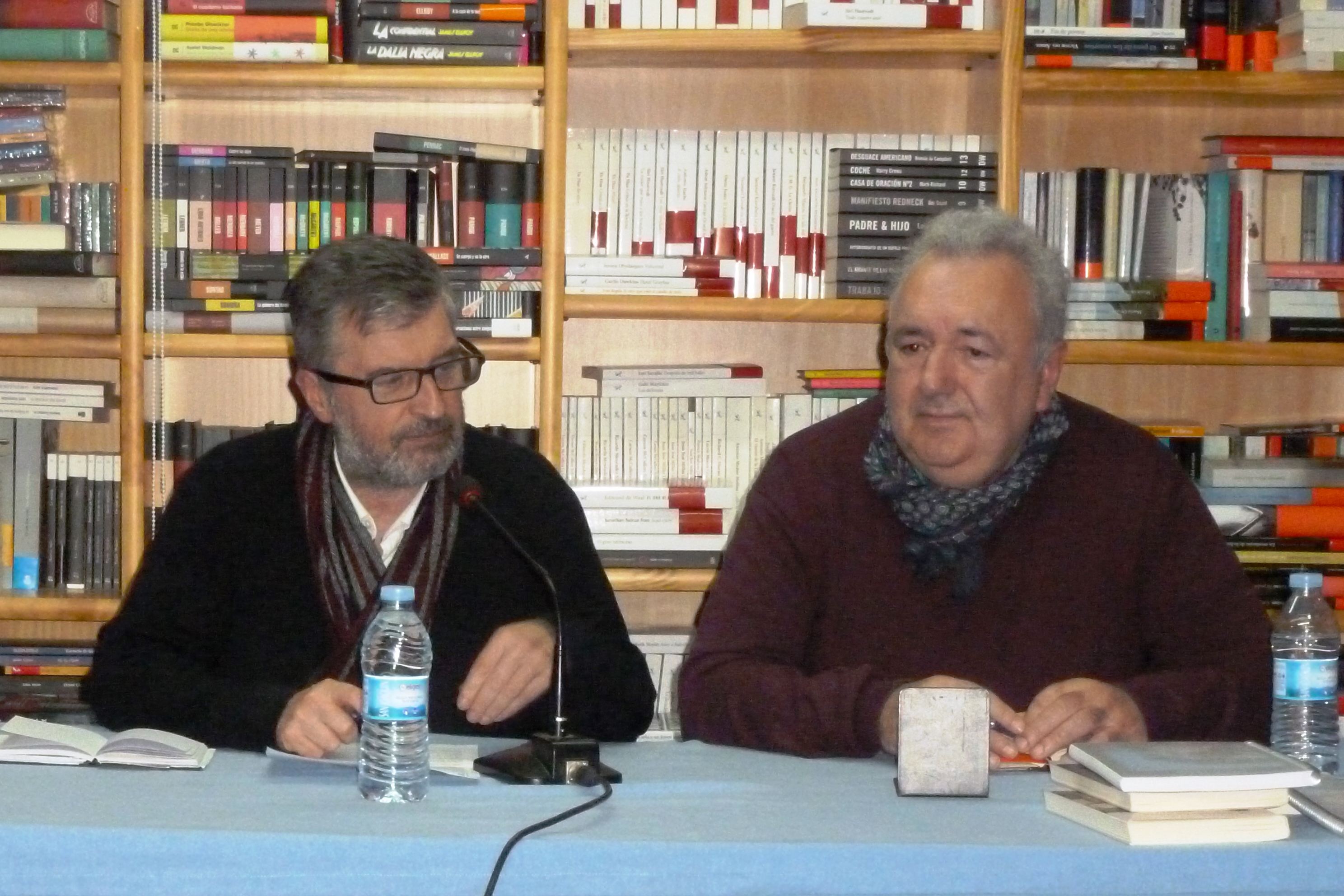 Manuel Bragado e Antonio Tizón na Libraría Paz de Pontevedra, na presentación de "Un home estraño"